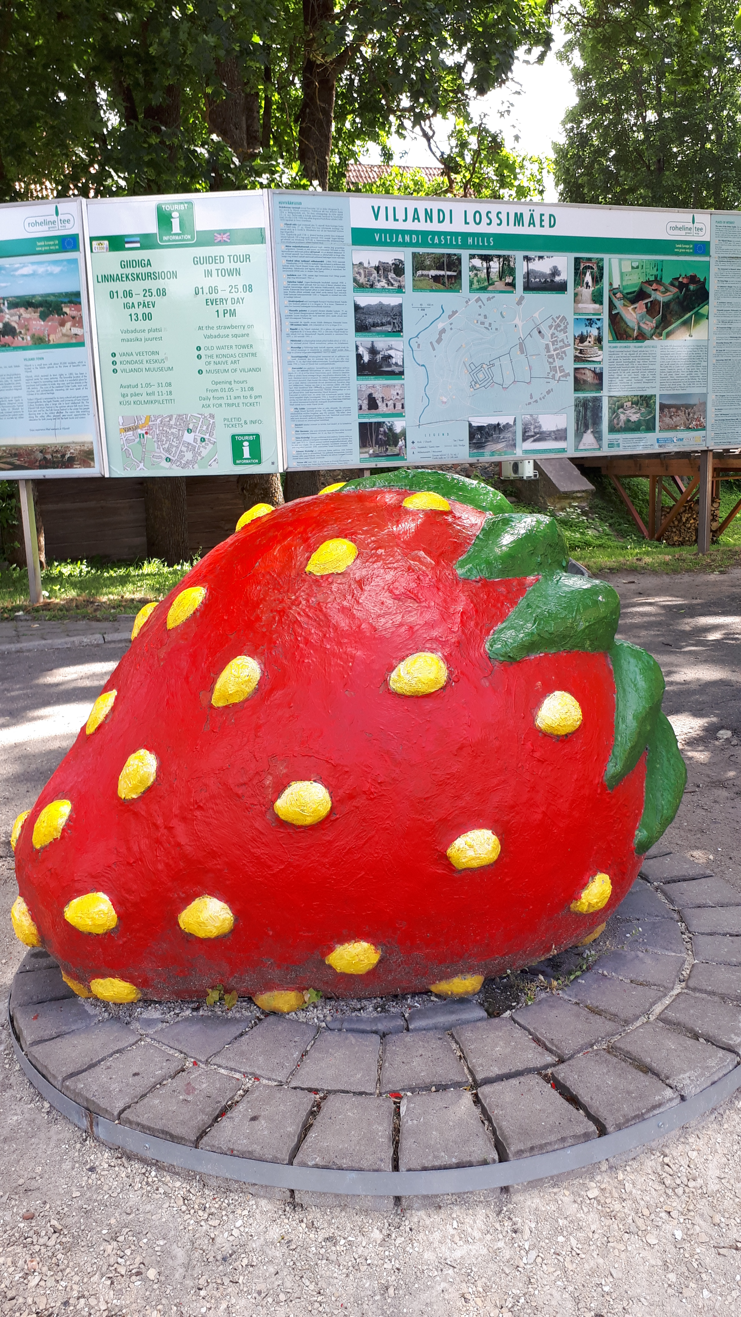 Sztuczna truskawka - w przestrzeni miejskiej Viljandi, Estonia.